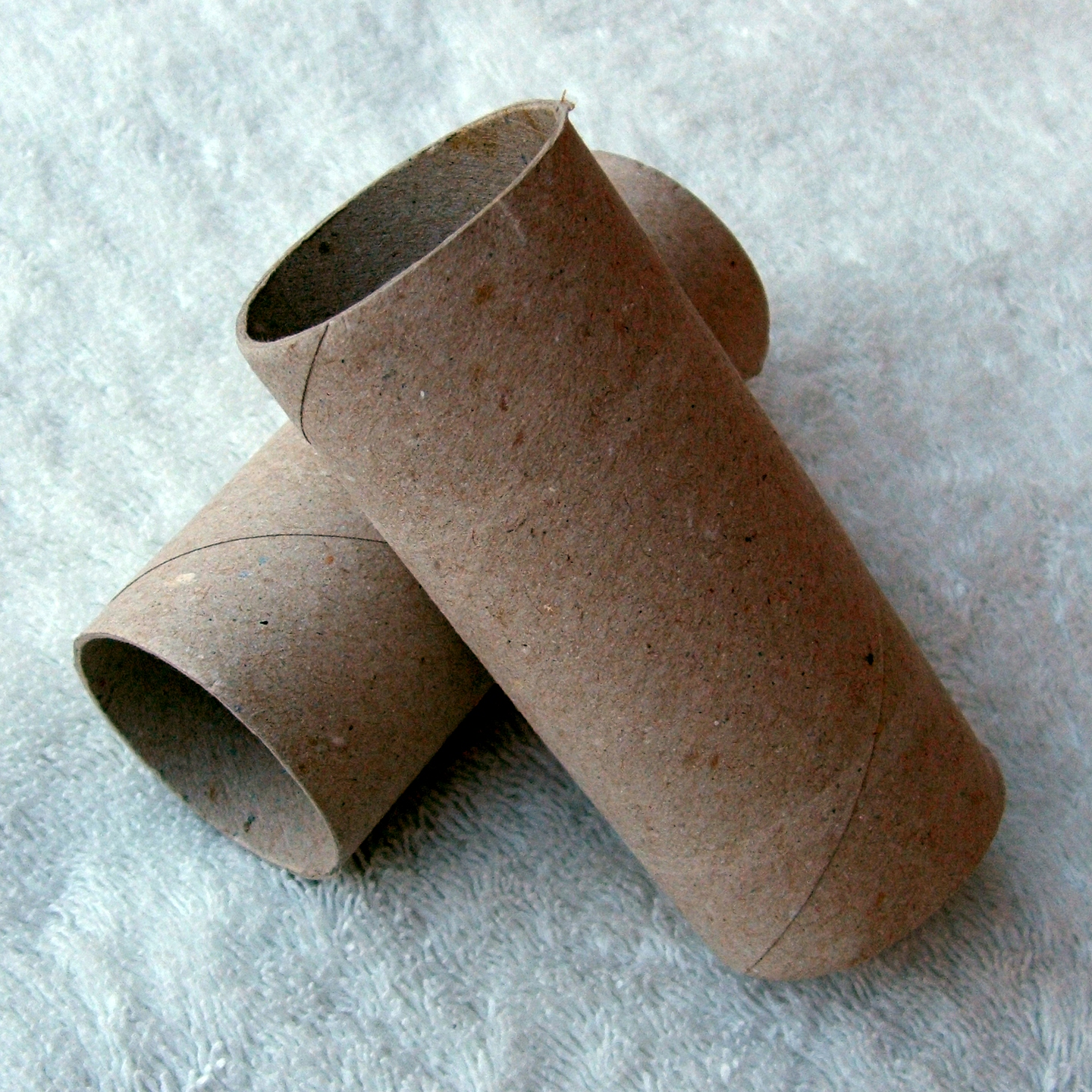 Anime di rotoli di carta igienica